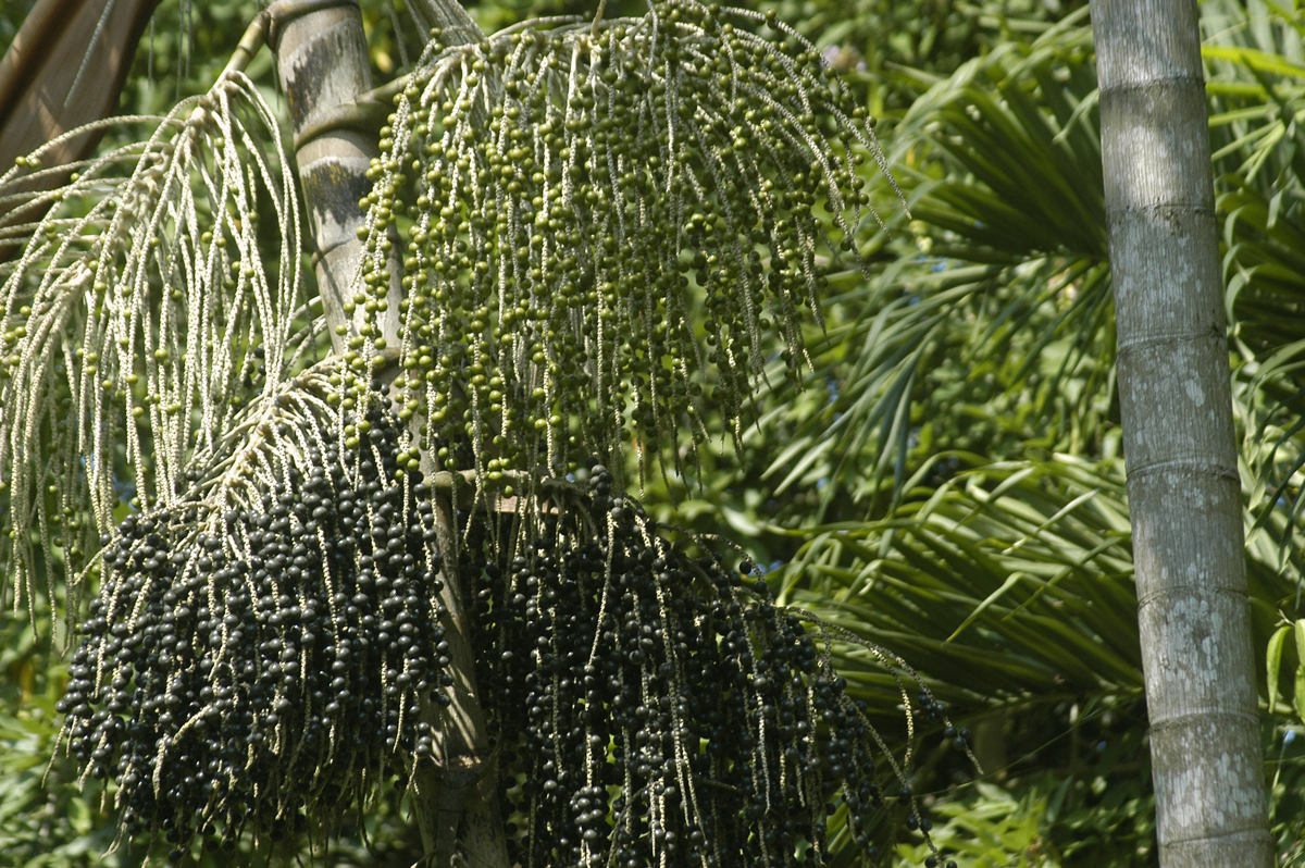 Açaí (Euterpe oleracea)